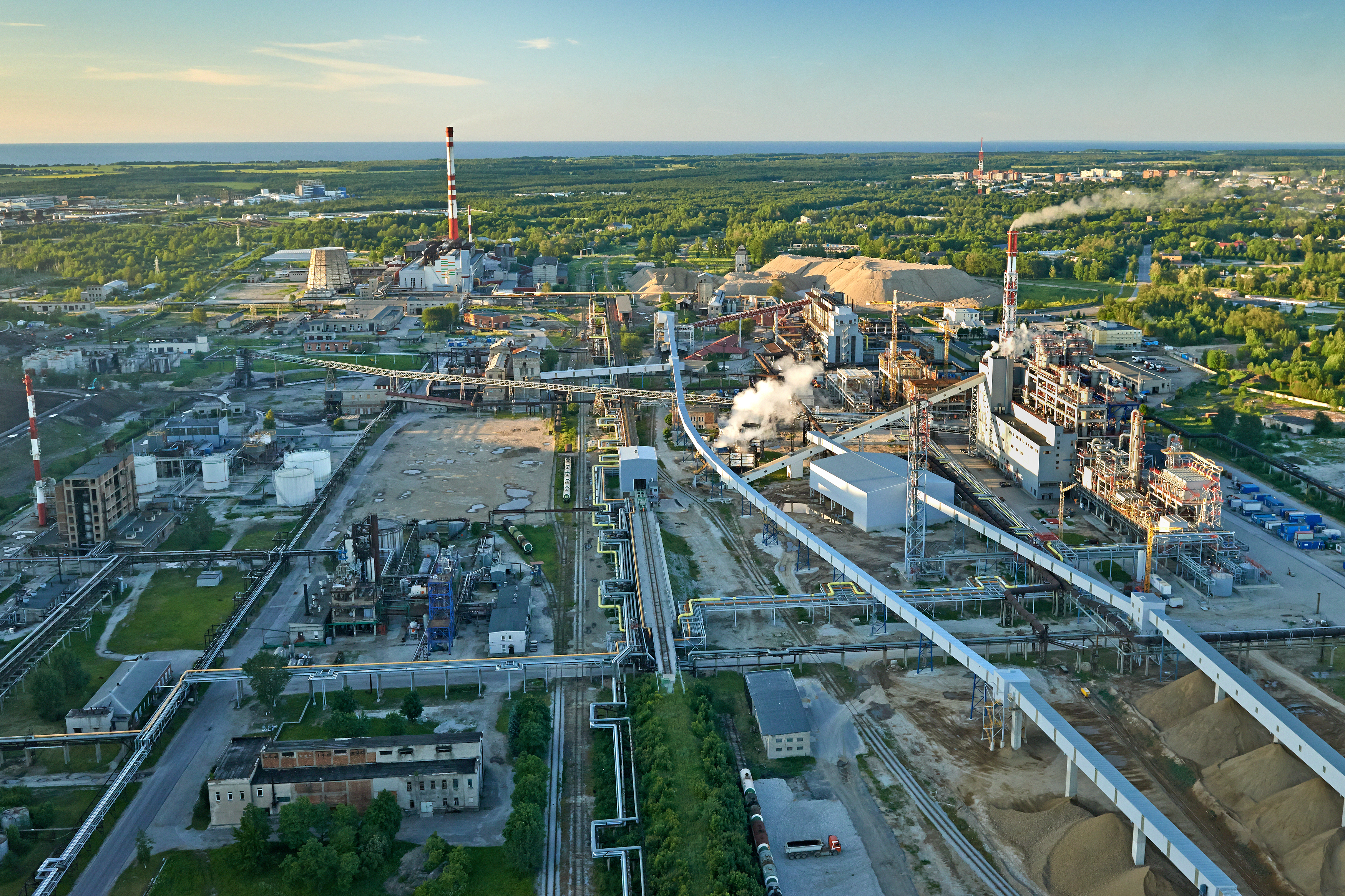 VKG Energia panoraamfoto.